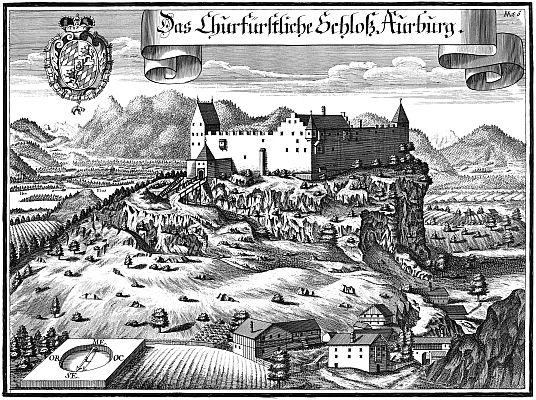 Kupferstich von Michael Wening: Auerburg bei Oberaudorf